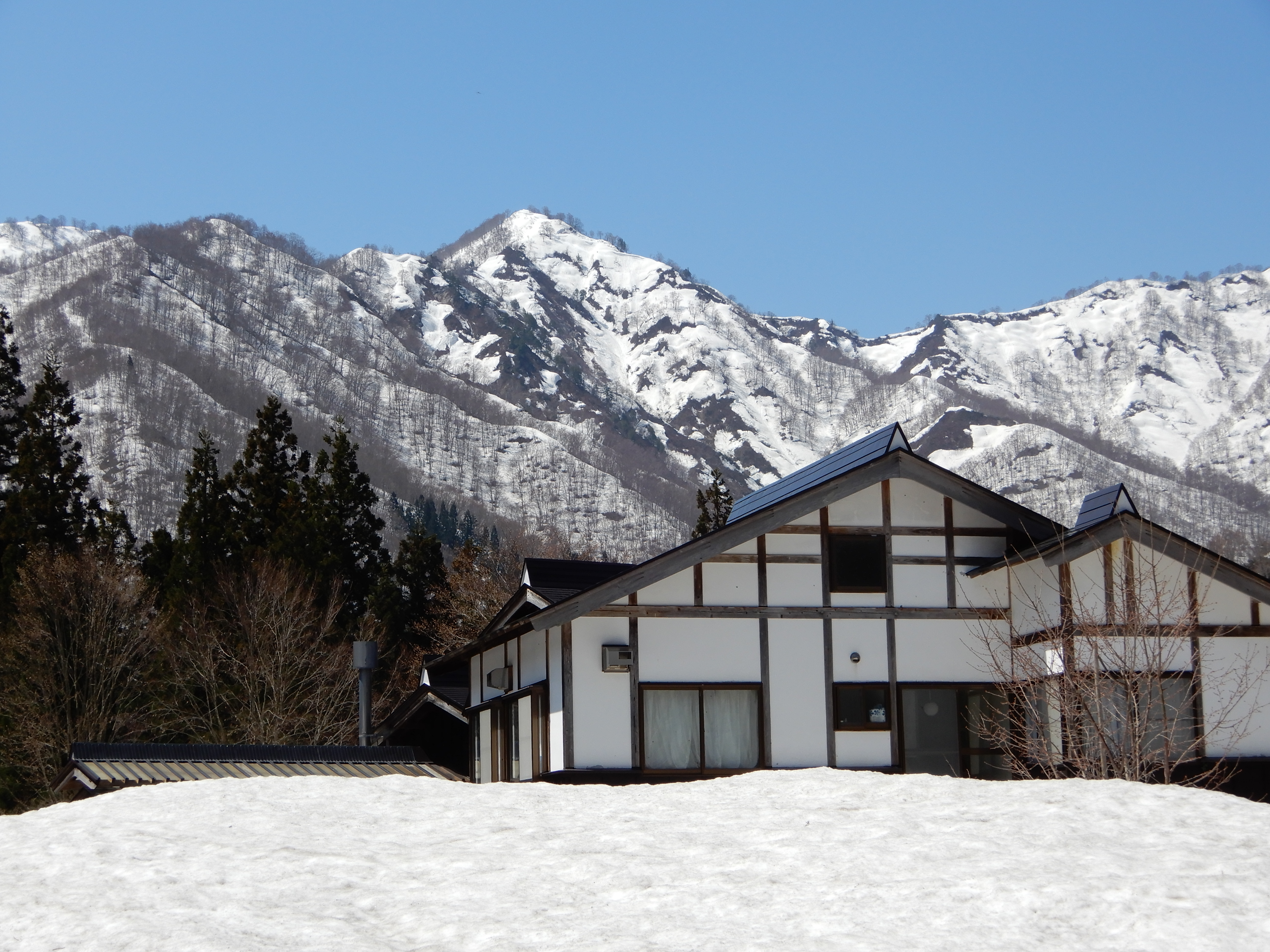 雲天より 2019-04-18